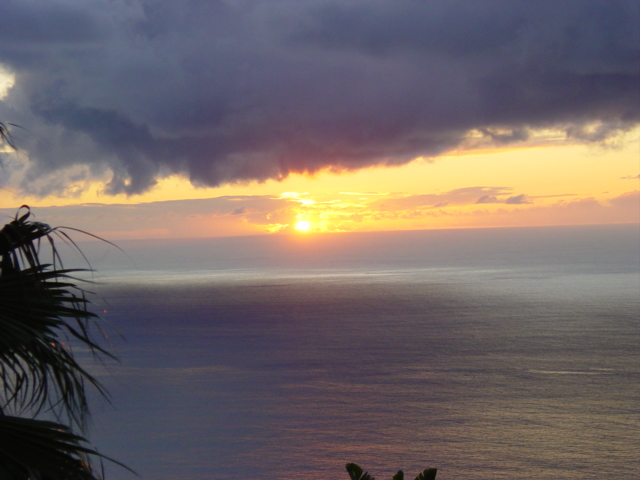 Atardecer desde Los Quemados (La Palma)